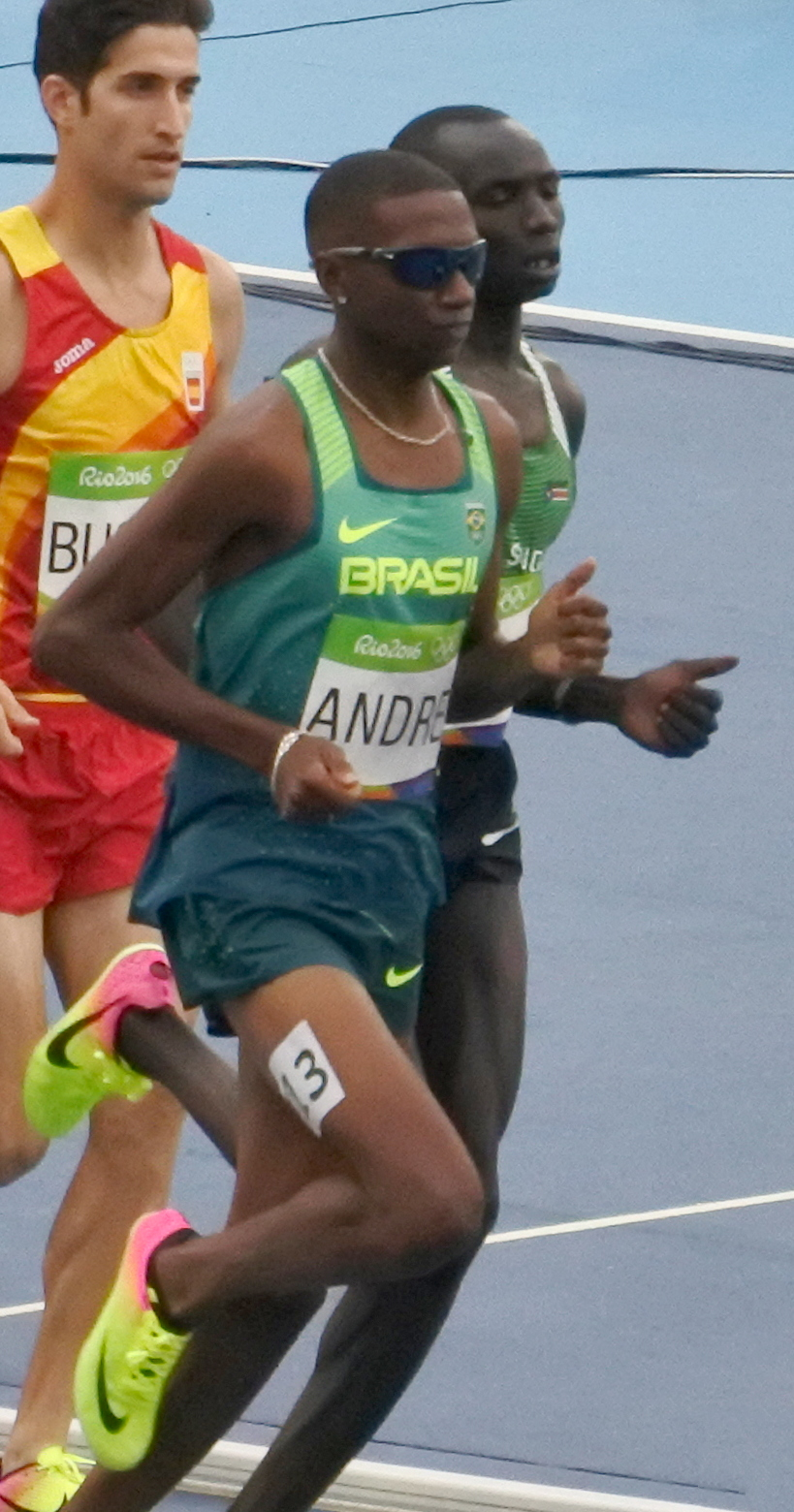 Rio 2016 - Eliminatórias 1500m Masculino